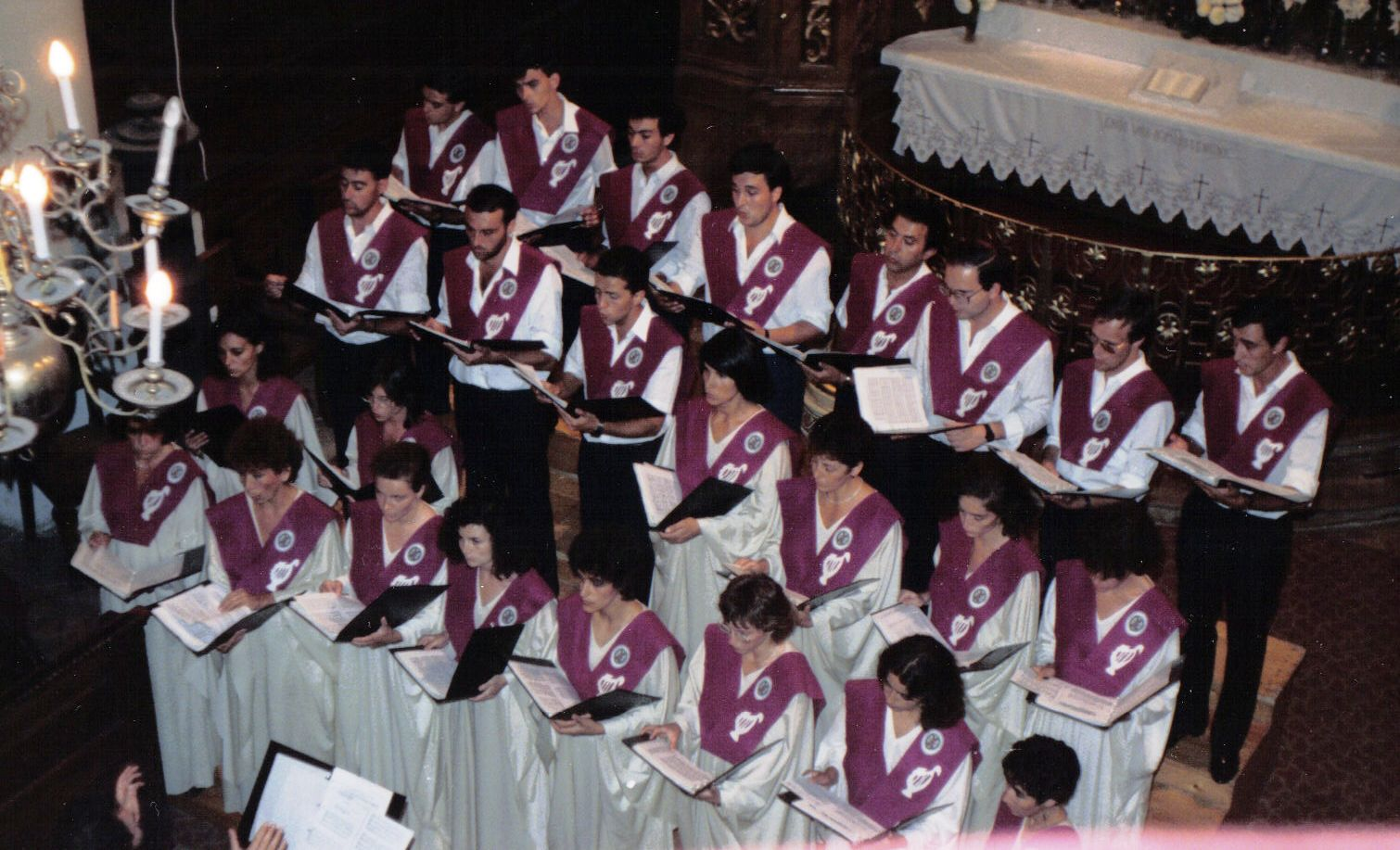 Coro Santo Tomás de Aquino de la Universidad Complutense de Madrid, 1987.